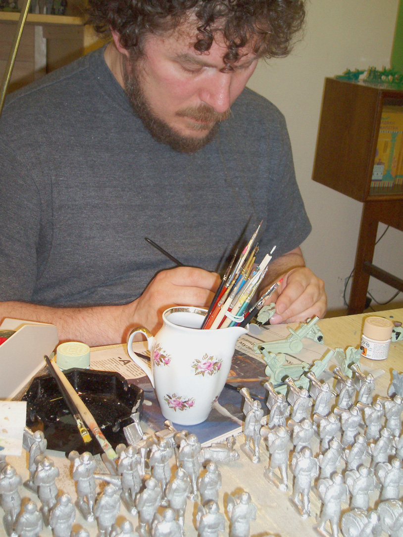 Тимур Замилов расписывает первых "солдатиков Ура!" 2004 г.